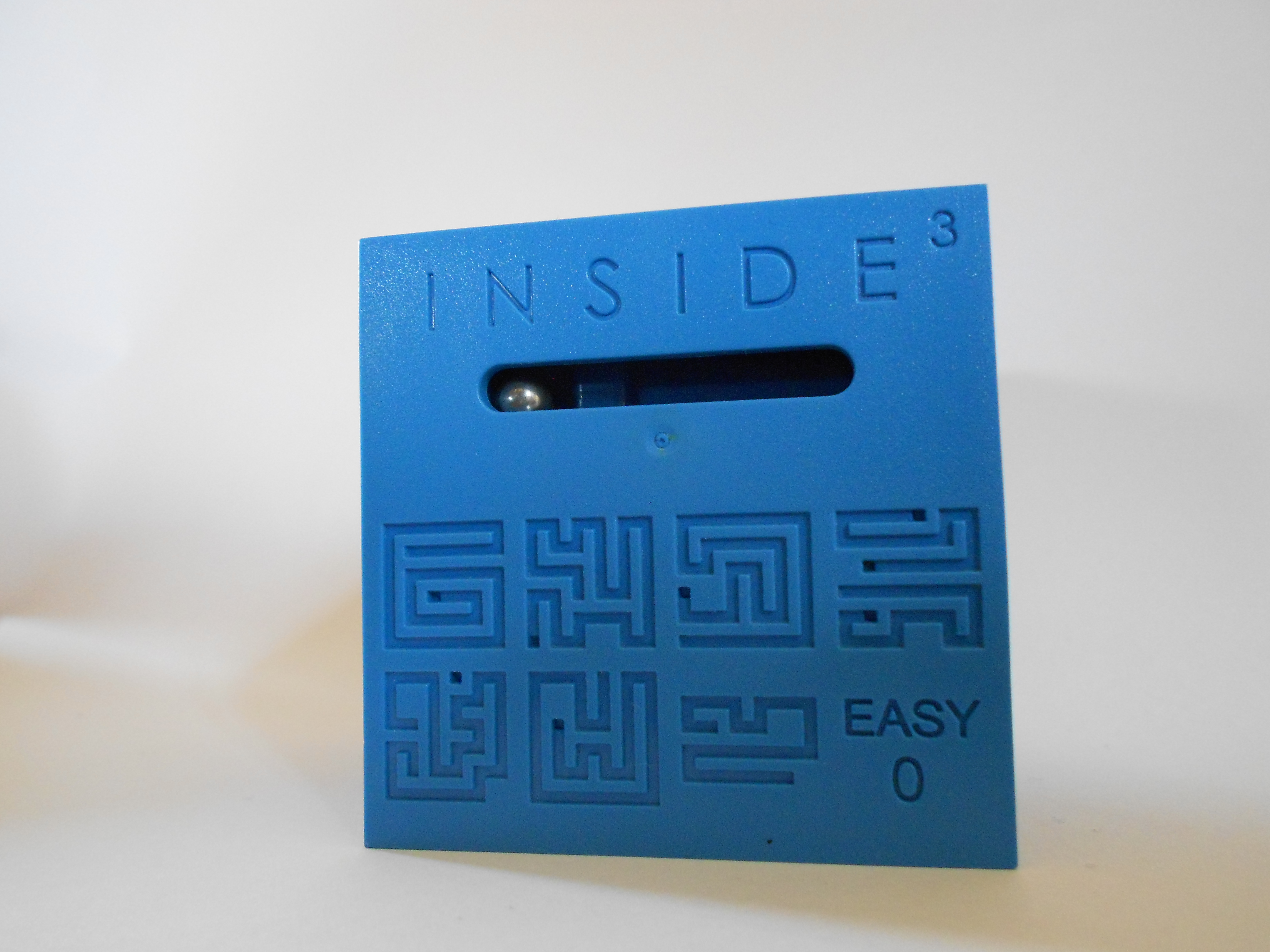 Face avant du Easy0, premier cube de la gamme INSIDE³